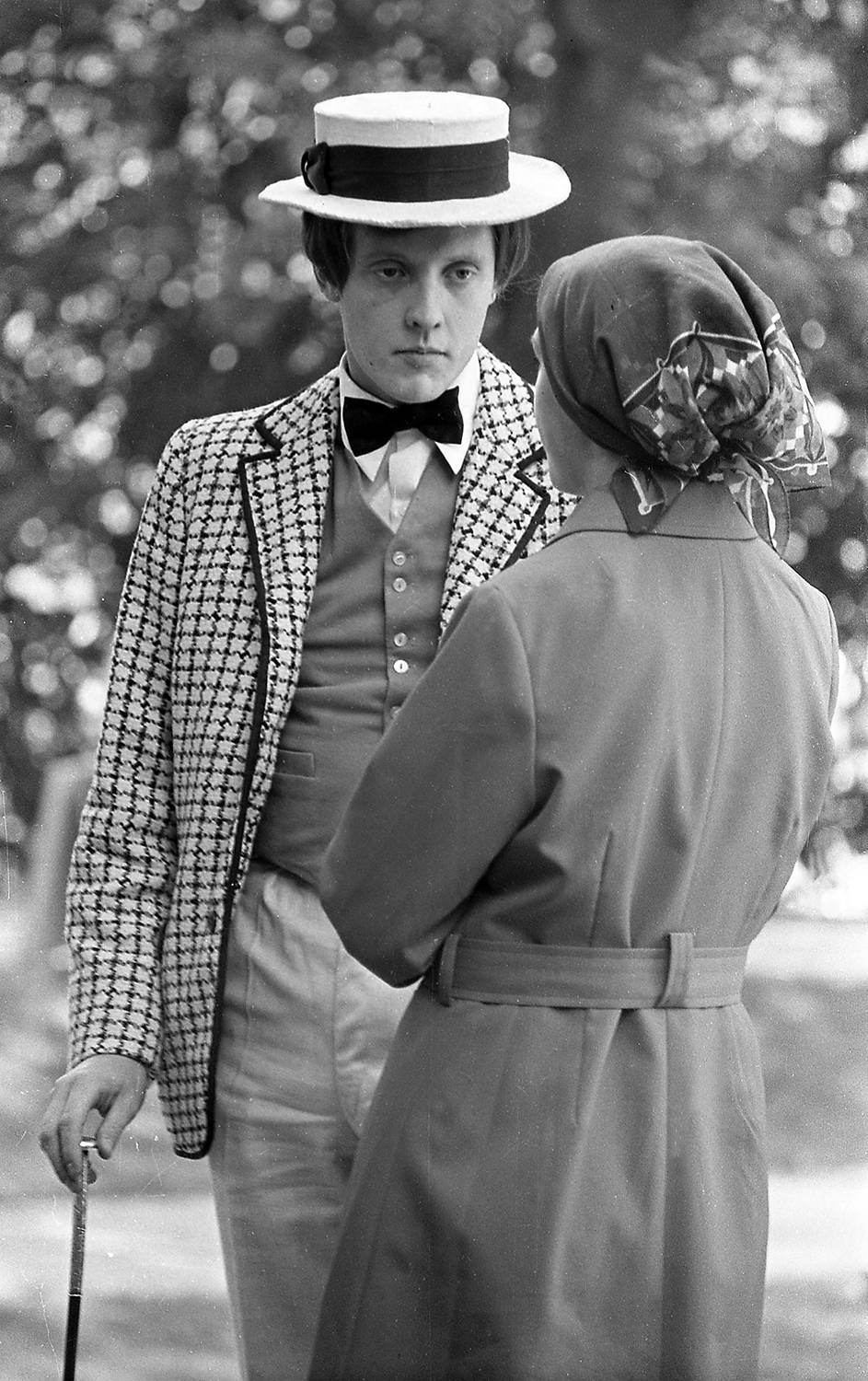 „Suvi“ tegelased Harju mäel Margus Lepa – Heinrich Georg Aadniel Kiir. 76